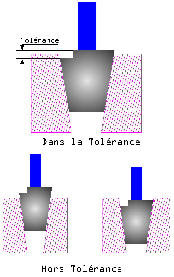 Tampón «Pasa/No Pasa».